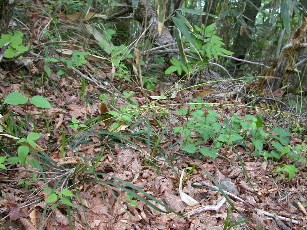 2005/06/04 和歌山県田辺市：Tanabe City. Wakayama Pref. Japan